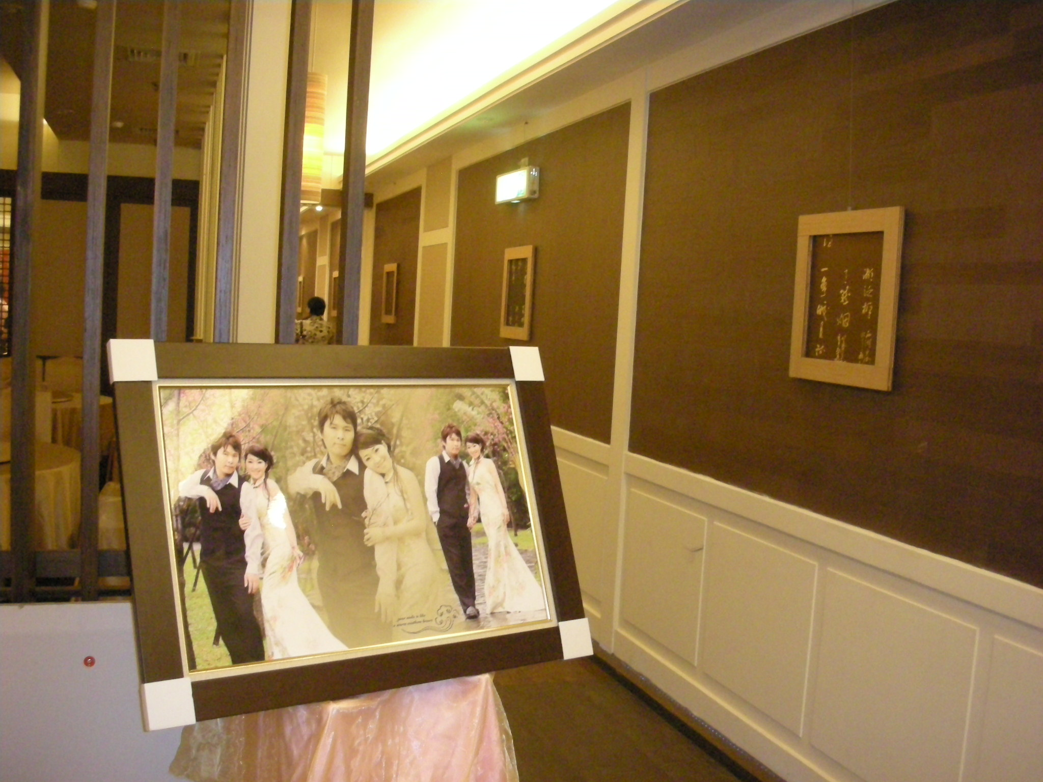 尚財與竹軒喜宴